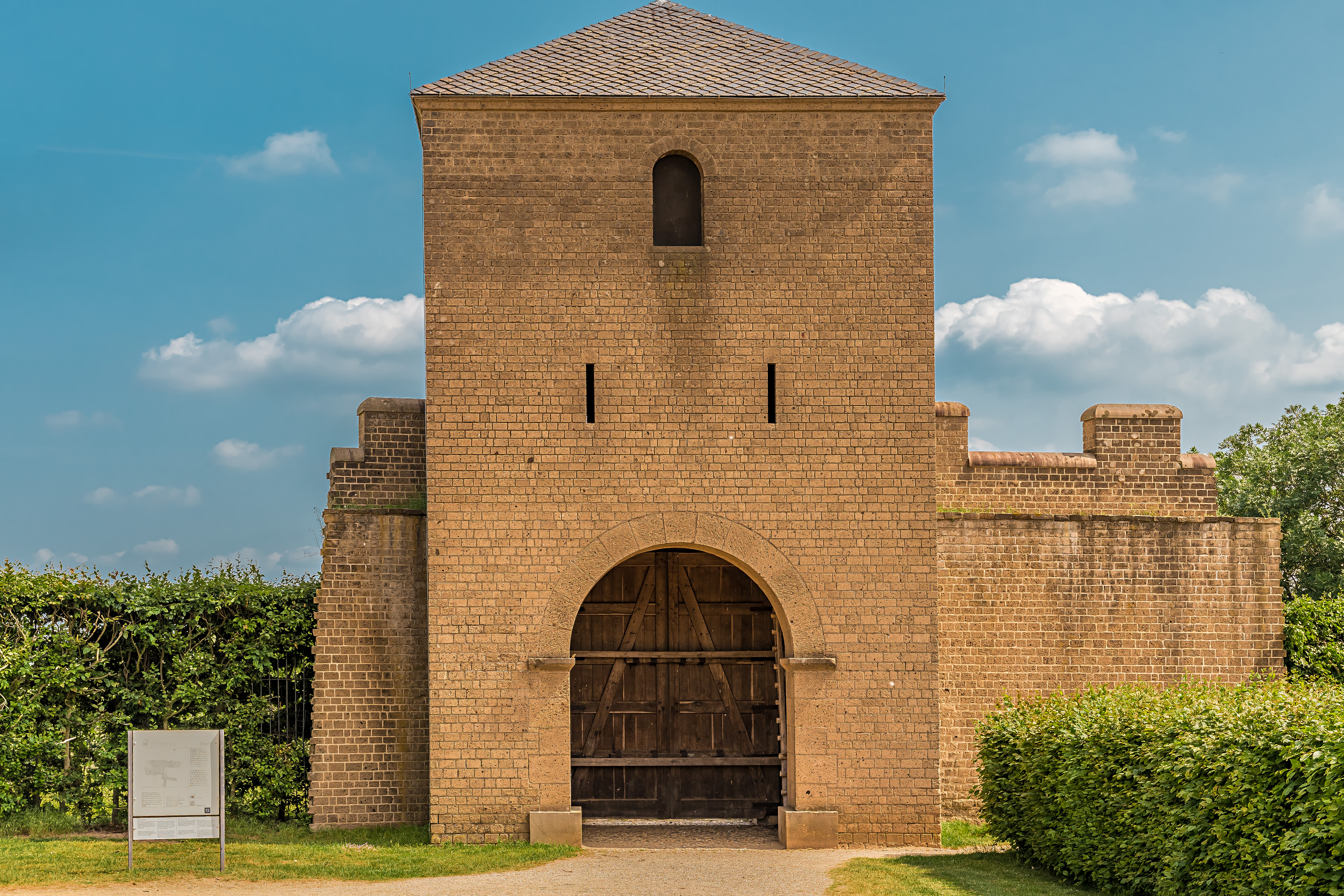 Rekonstruierter Hafenturm (Hafentor) im Archäologischen Park Xanten (APX) auf dem Gelände der vergangenen Stadt Colonia Ulpia Traiana (CUT)